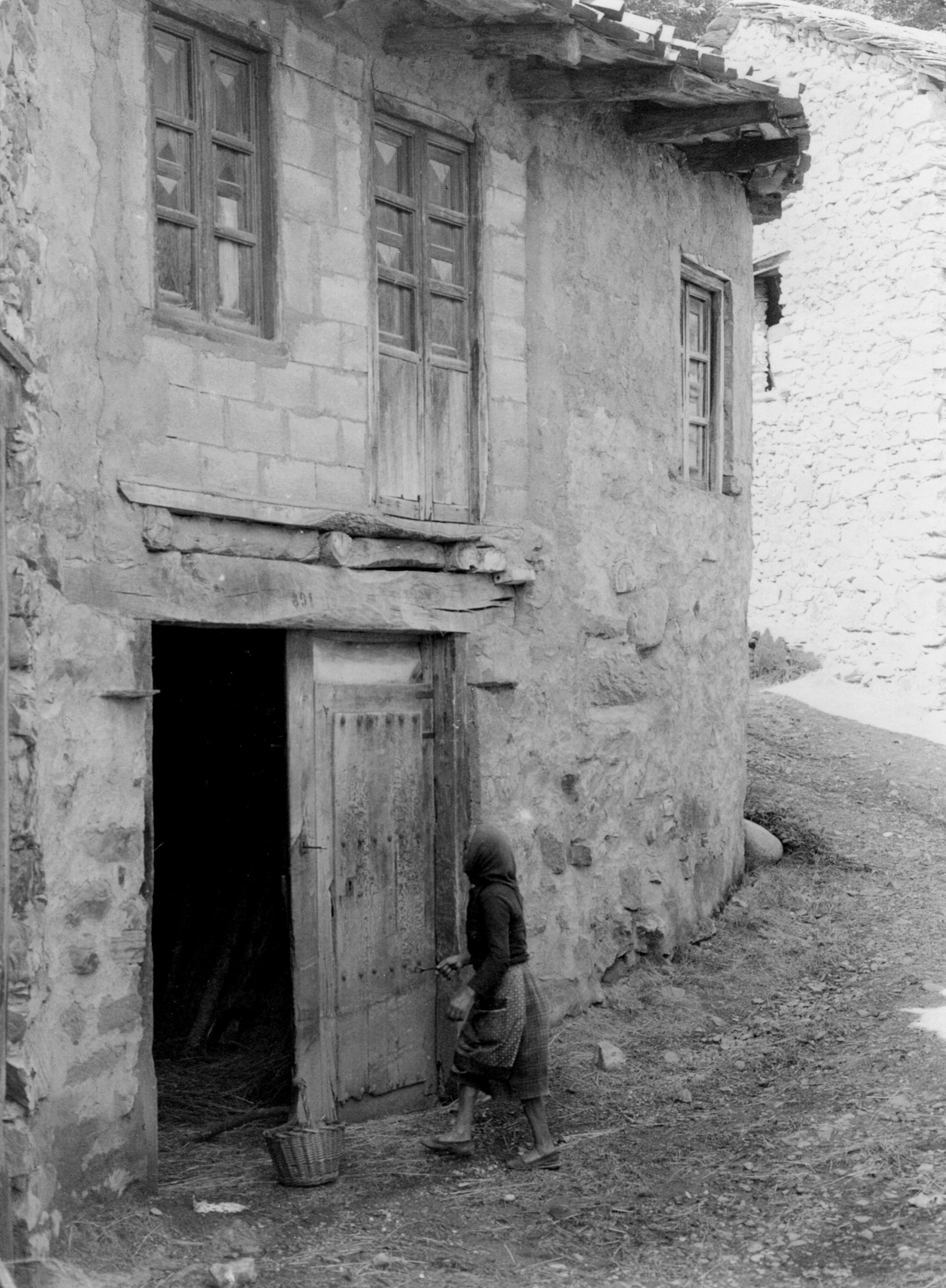 La valdería años 1970. Comarca de León, España, agosto de 197?.